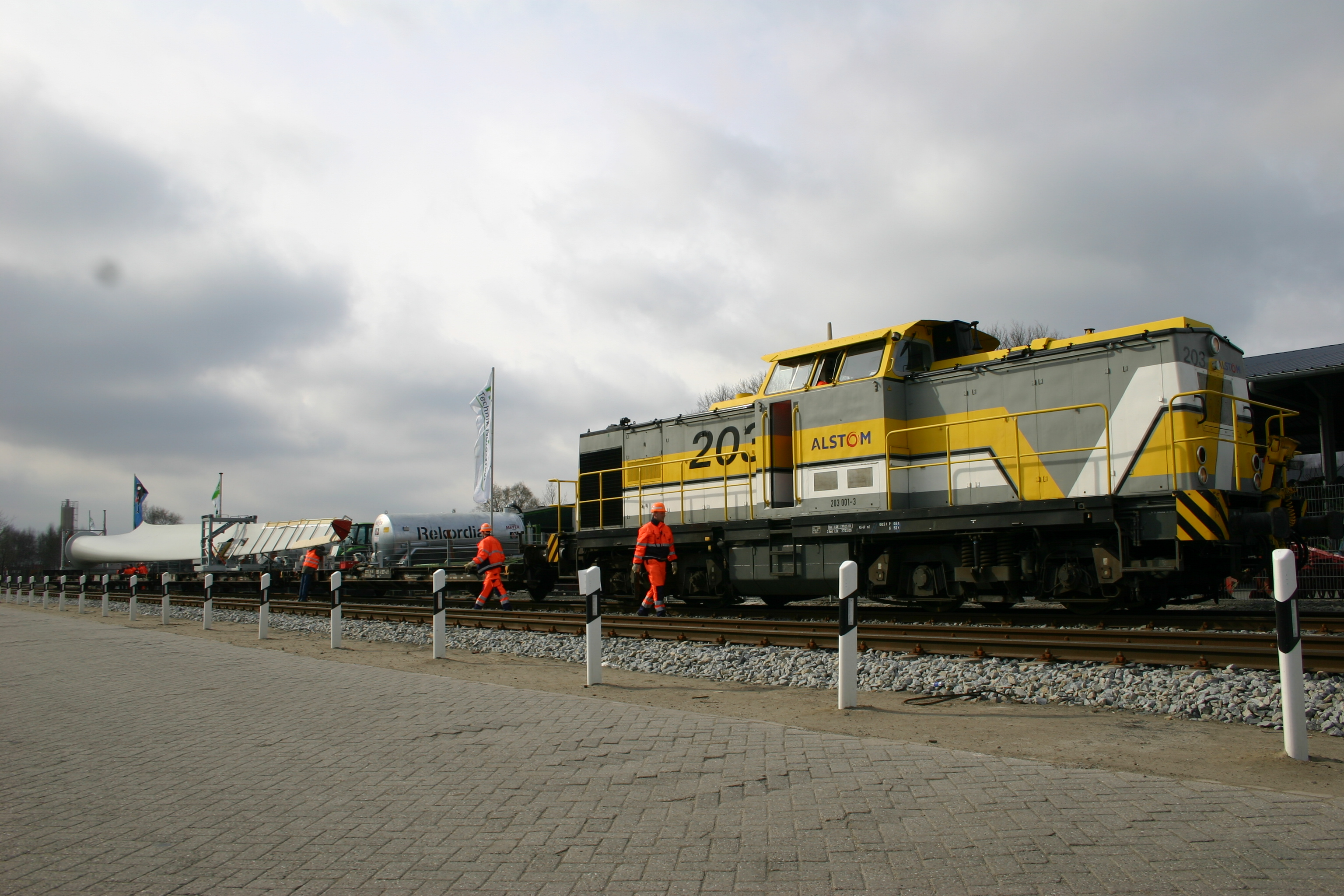 Bahnverladung von Rotorblättern des Windenergieanlagenherstellers Enercon in Aurich